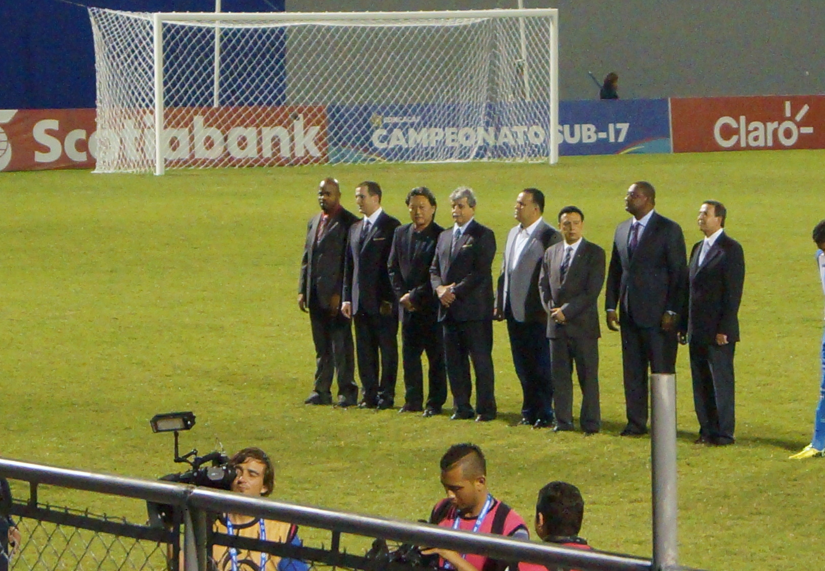 Comite ejecutivo de la Concacaf. En su visita a San Pedro Sula en 2015. Campeonato sub 17 de la Region